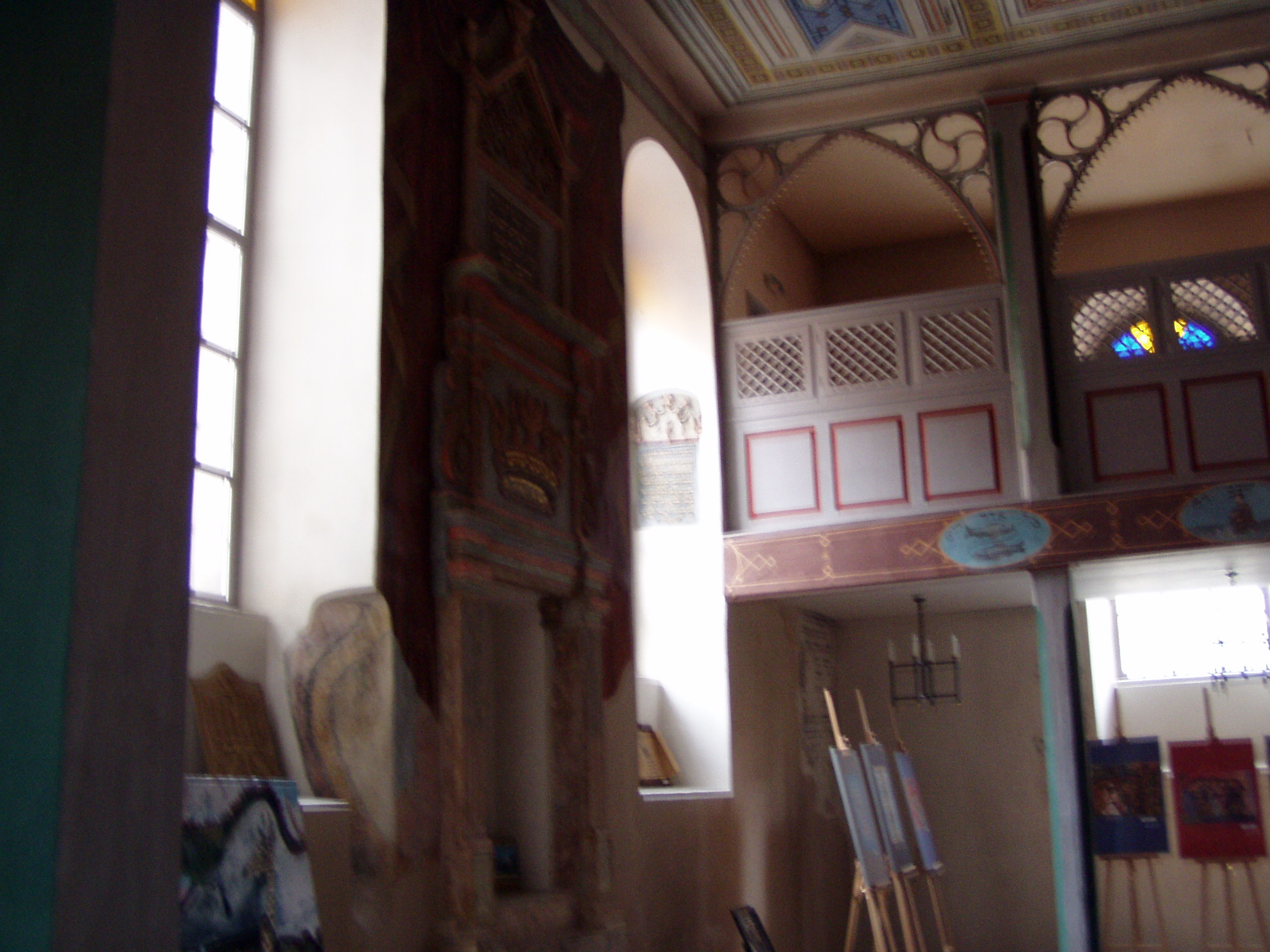 Synagoga Kupa w Krakowie Author: Wikipedysta:Birczanin